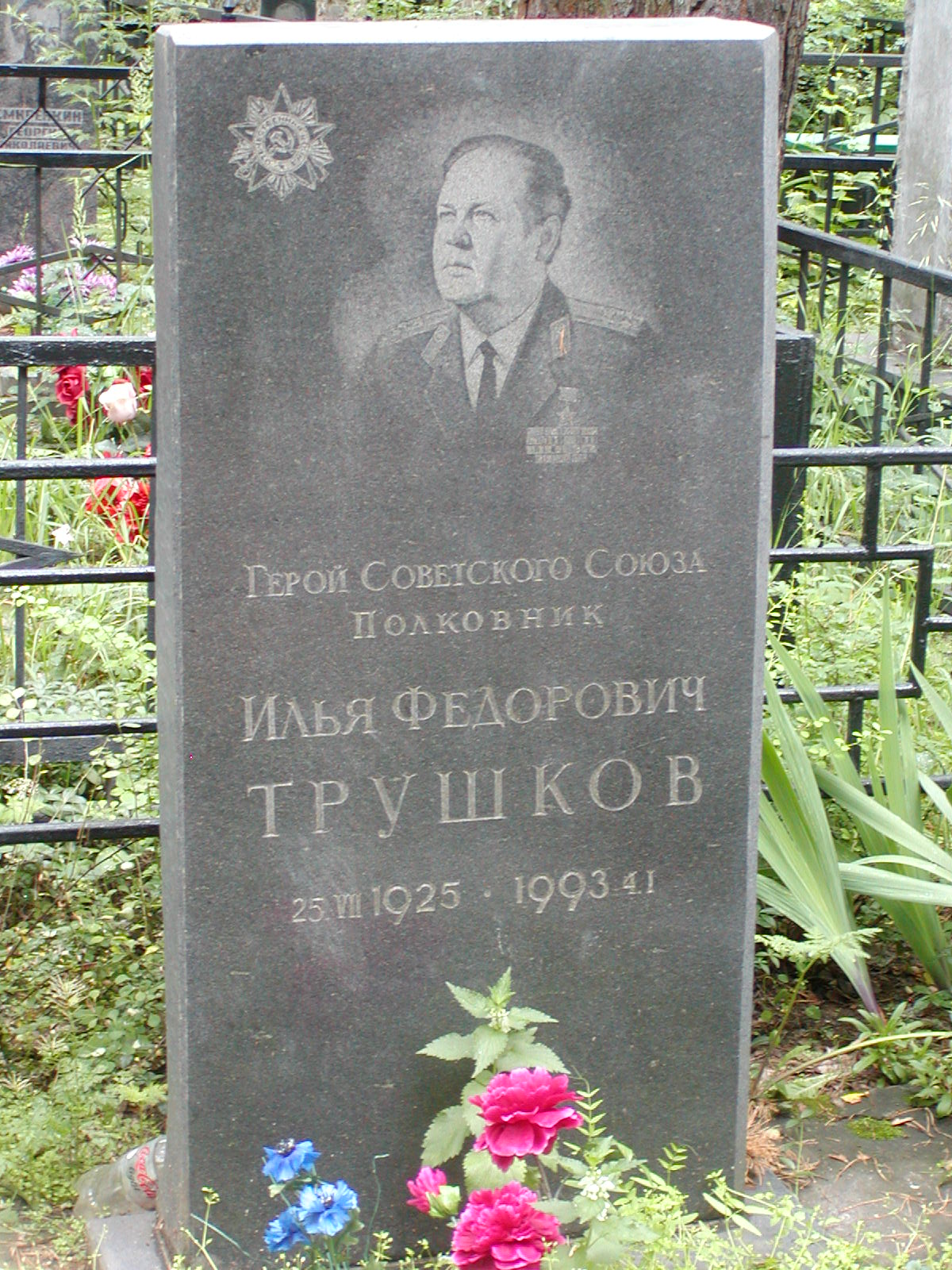 Надгробный памятник Илье Фёдоровичу Трушкову на Кончаловском кладбище в Обнинске